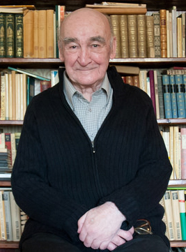 Ain Kaalep on 2010/03/30